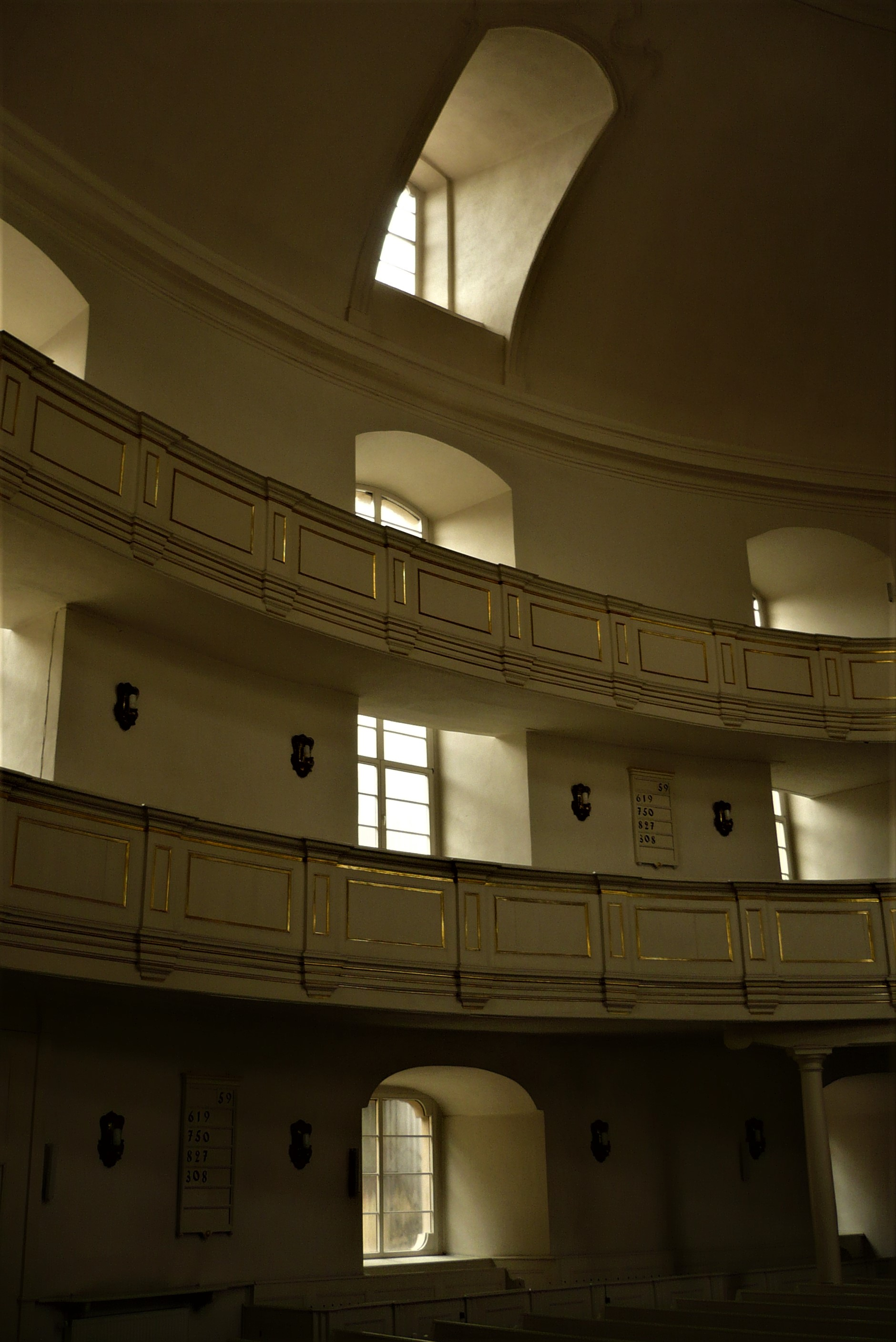 Kościół Opatrzności Bożej we Wrocławiu